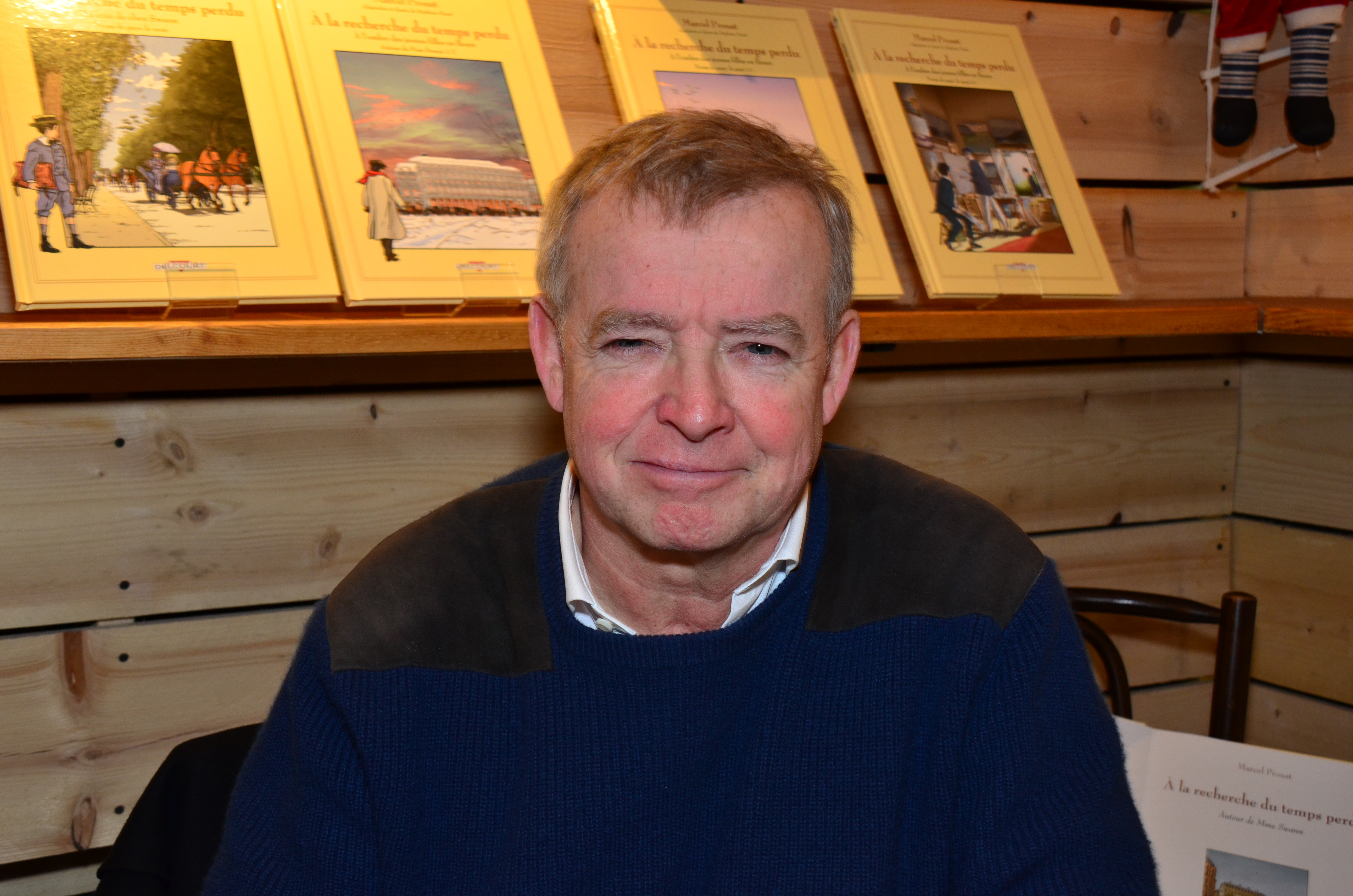 Stéphane Heuet en dédicace à Template:Illiers-Combray le 6 décembre 2019